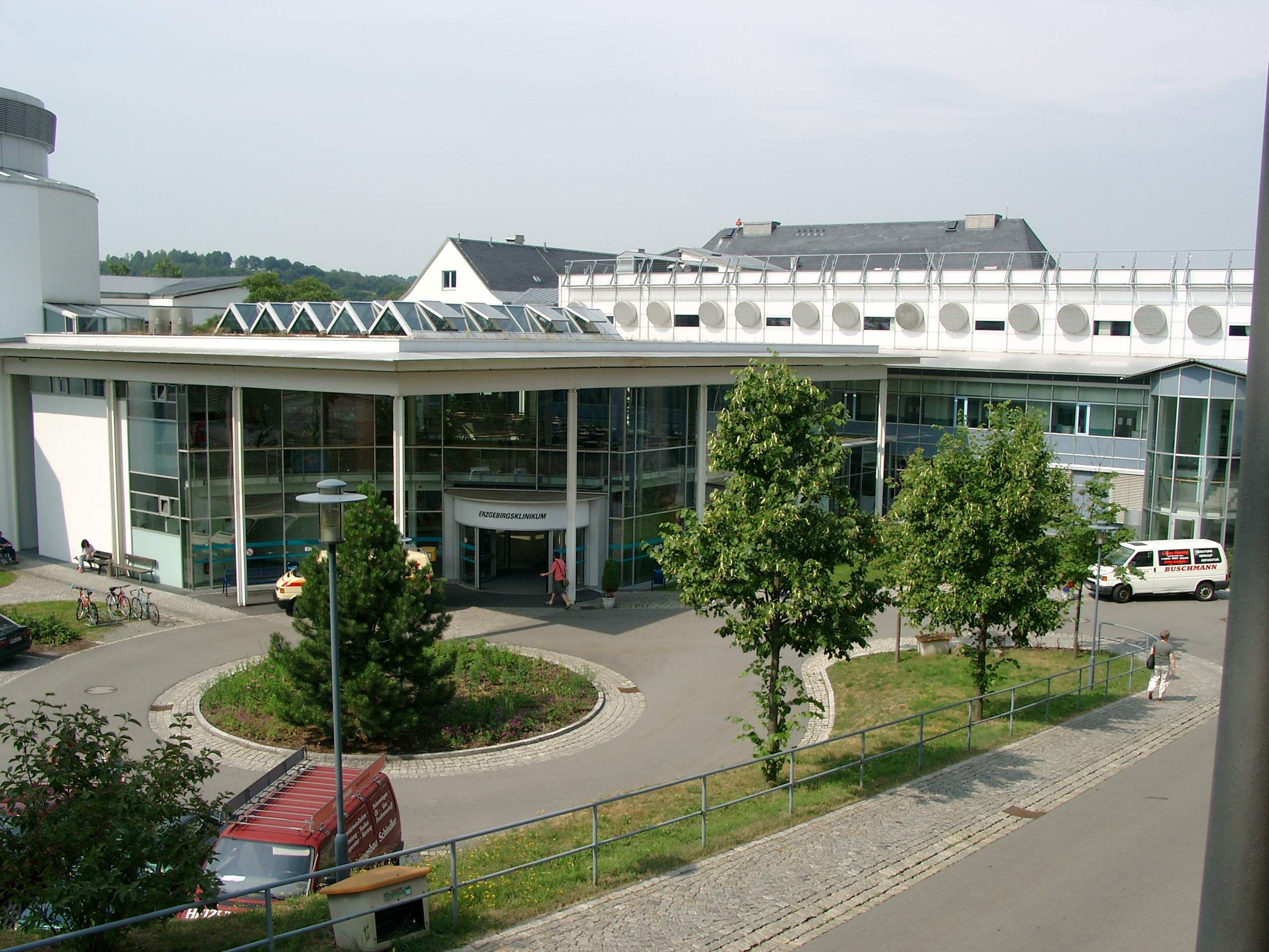 Eingangsbereich des Erzgebirgsklinikums Annaberg; rechts der neue Untersuchungs- und Behandlungstrakt, im Hintergrund das Dach des ehemaligen Haus A